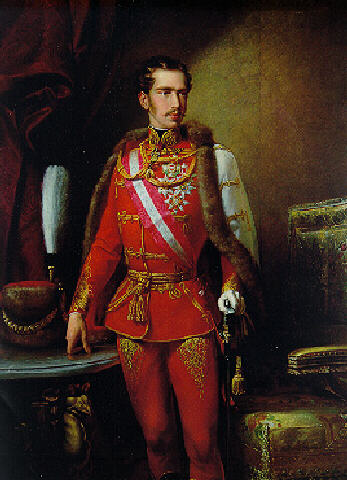 I. Ferenc József magyar és cseh király, osztrák császár (1830–1916) arcmása magyar huszárruhában.